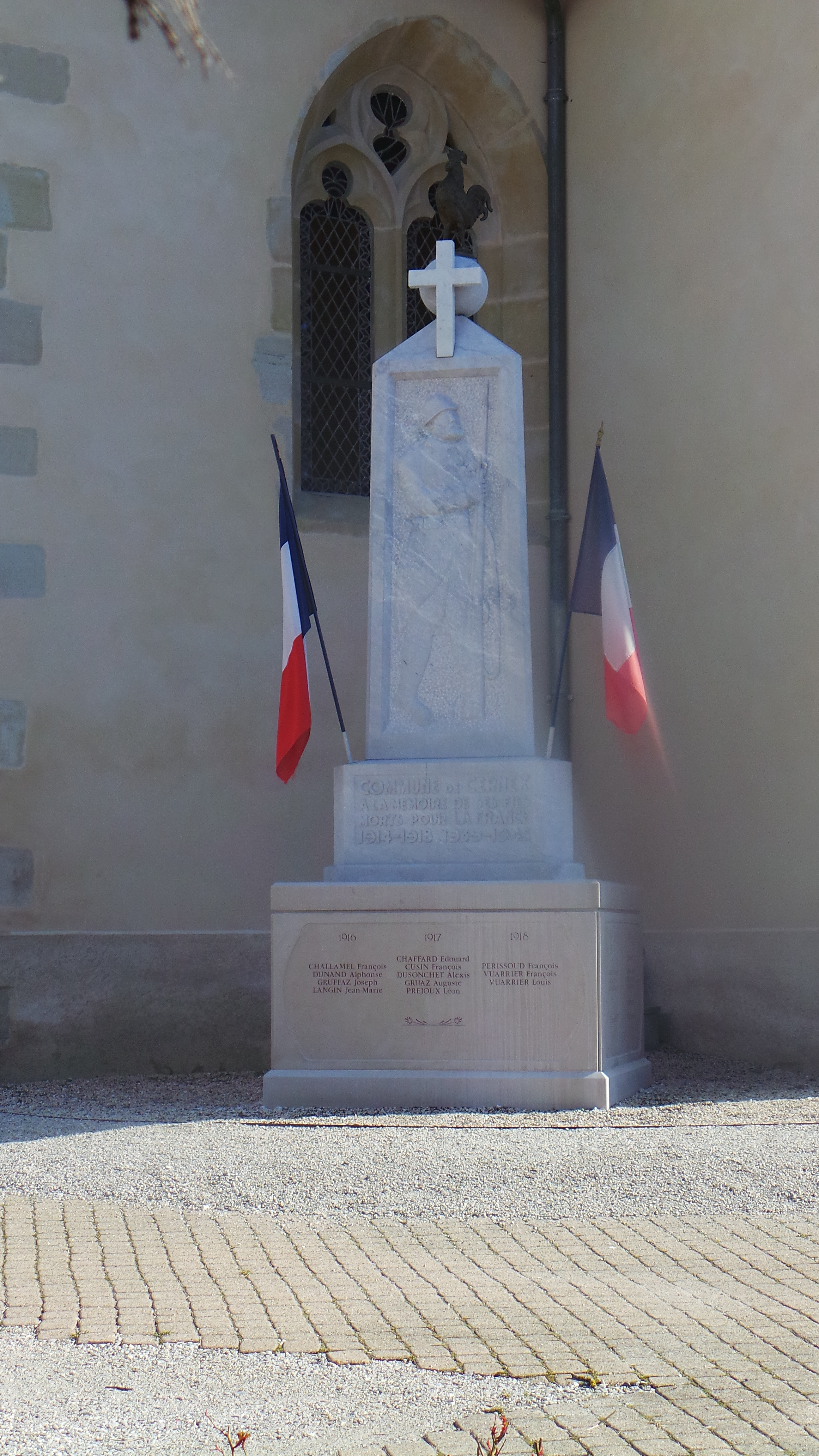 Français